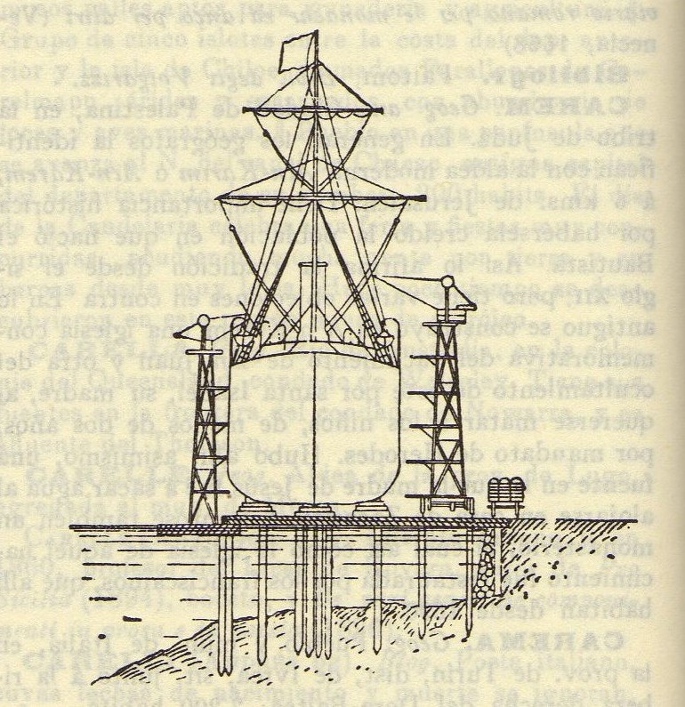 Corte transversal de un carenero de pilotaje mostrando la posición de un barco sobre él y la disposición de los andamios para el recorrido de la nave.